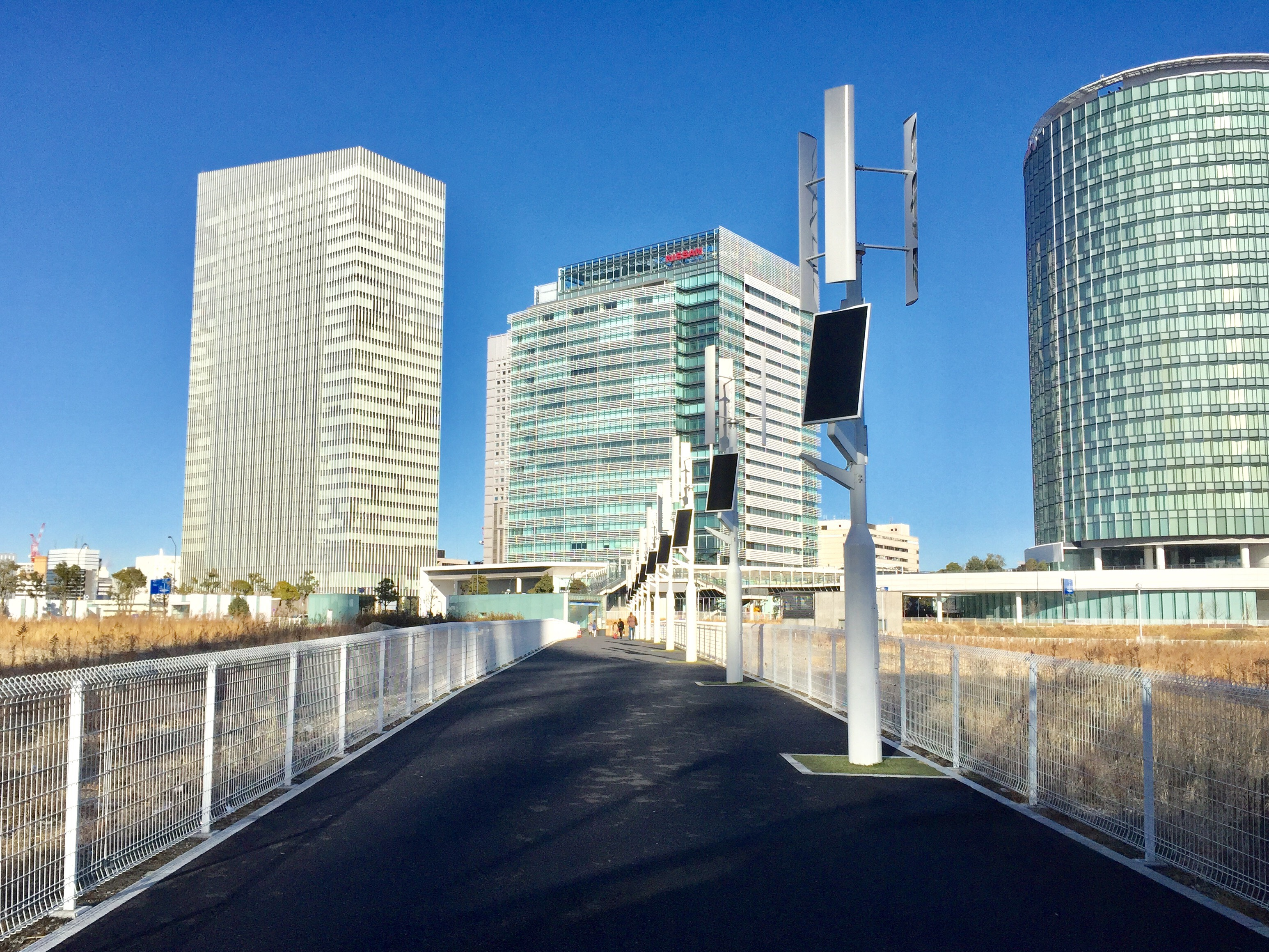 横浜みなとみらい地区53街区の旧GENTO YOKOHAMA跡に整備された暫定歩行者通路（グランモール公園方面とみなとみらい線新高島駅方面を結ぶ）。太陽光発電と風力発電を利用しさらに蓄電池も内蔵した「ハイブリッド街路灯」が設置されている。